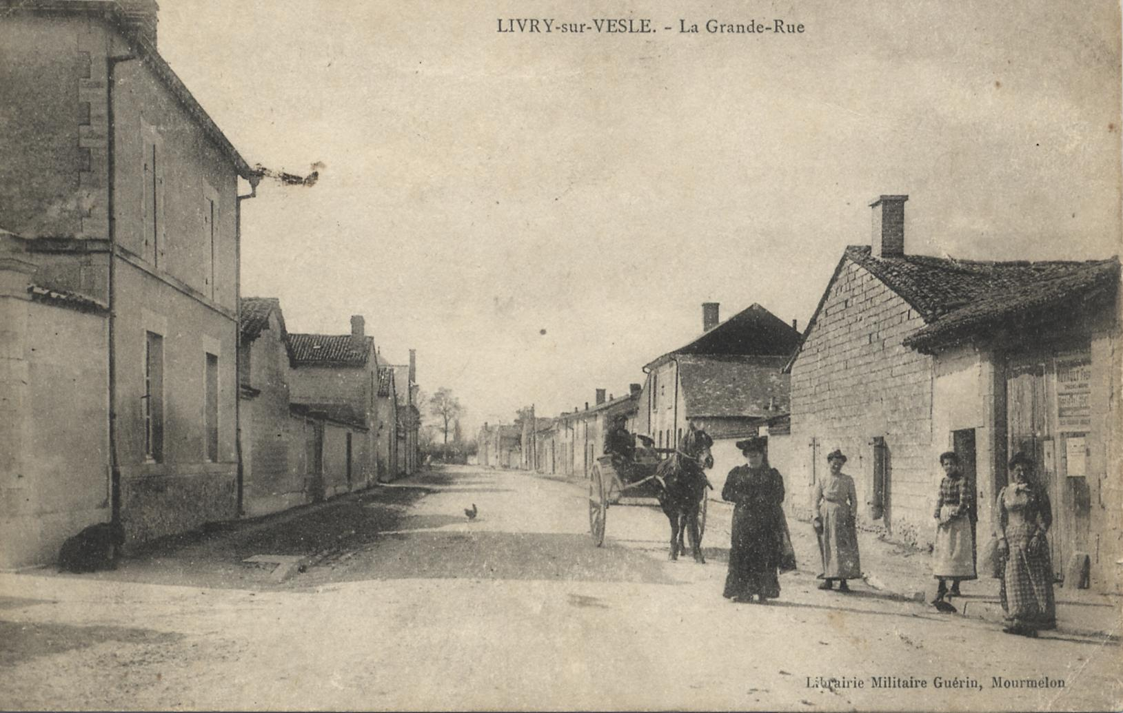 Collection personnelle de Mme LORAIN ; directrice de l'école élémentaire de Livry-Louvercy Éditeur : Librairie Guérin à Mourmelon-le-Grand Scan : Dominique NOËL